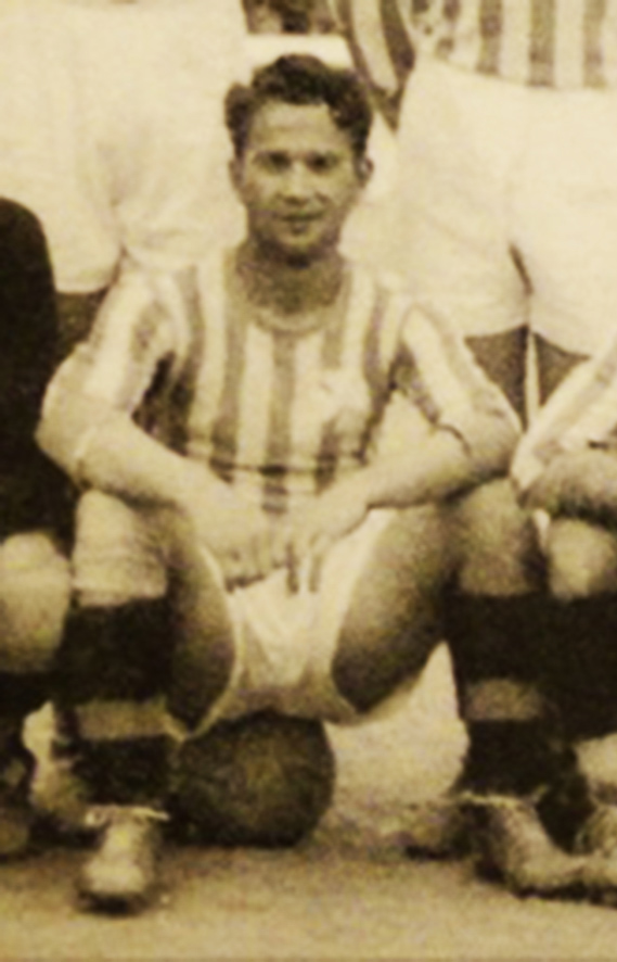 Ο Τάκης Τριανταφύλλης το 1936